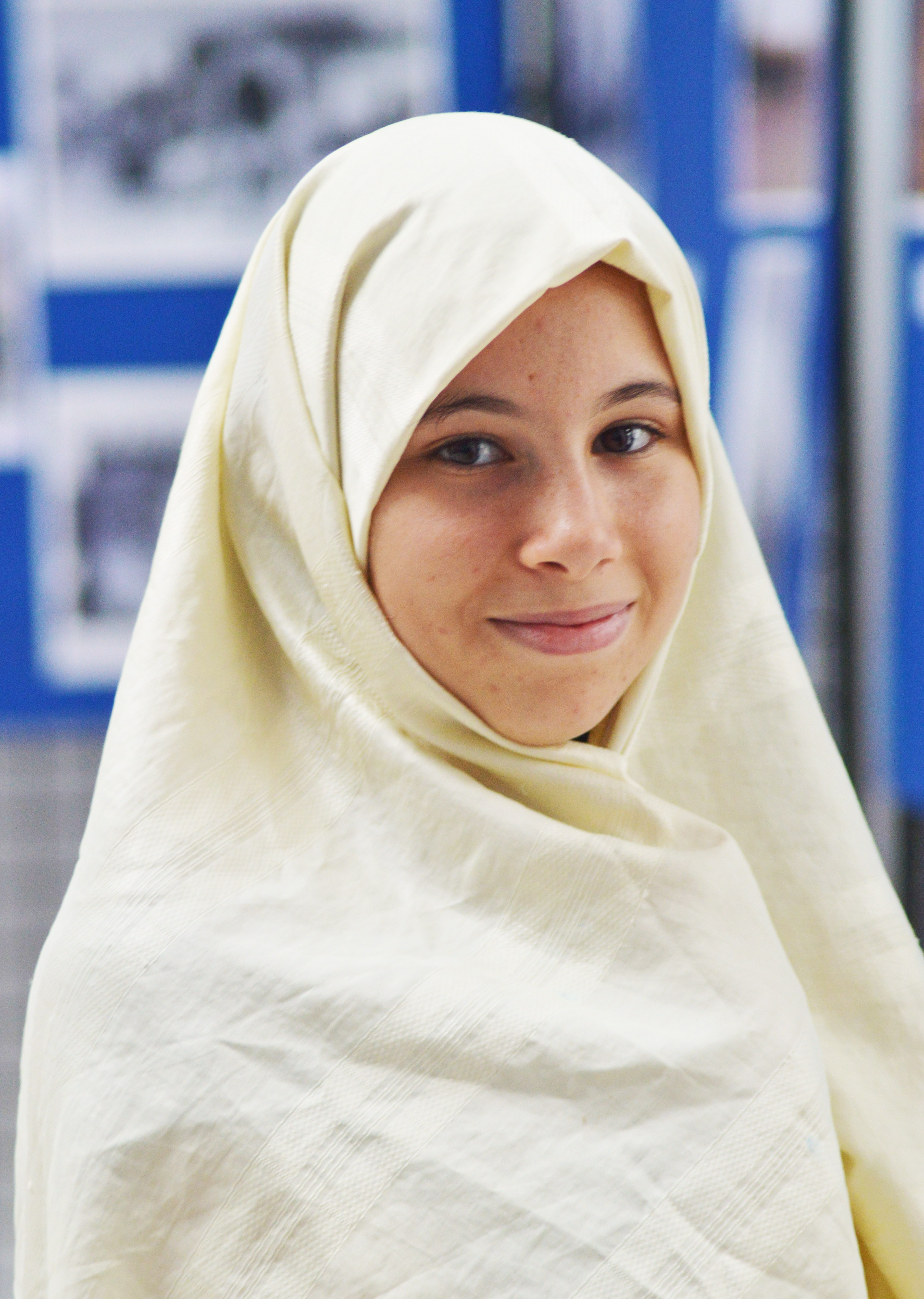 السفساري التونسي This is an image of Cultural Fashion or Adornment from Tunisia